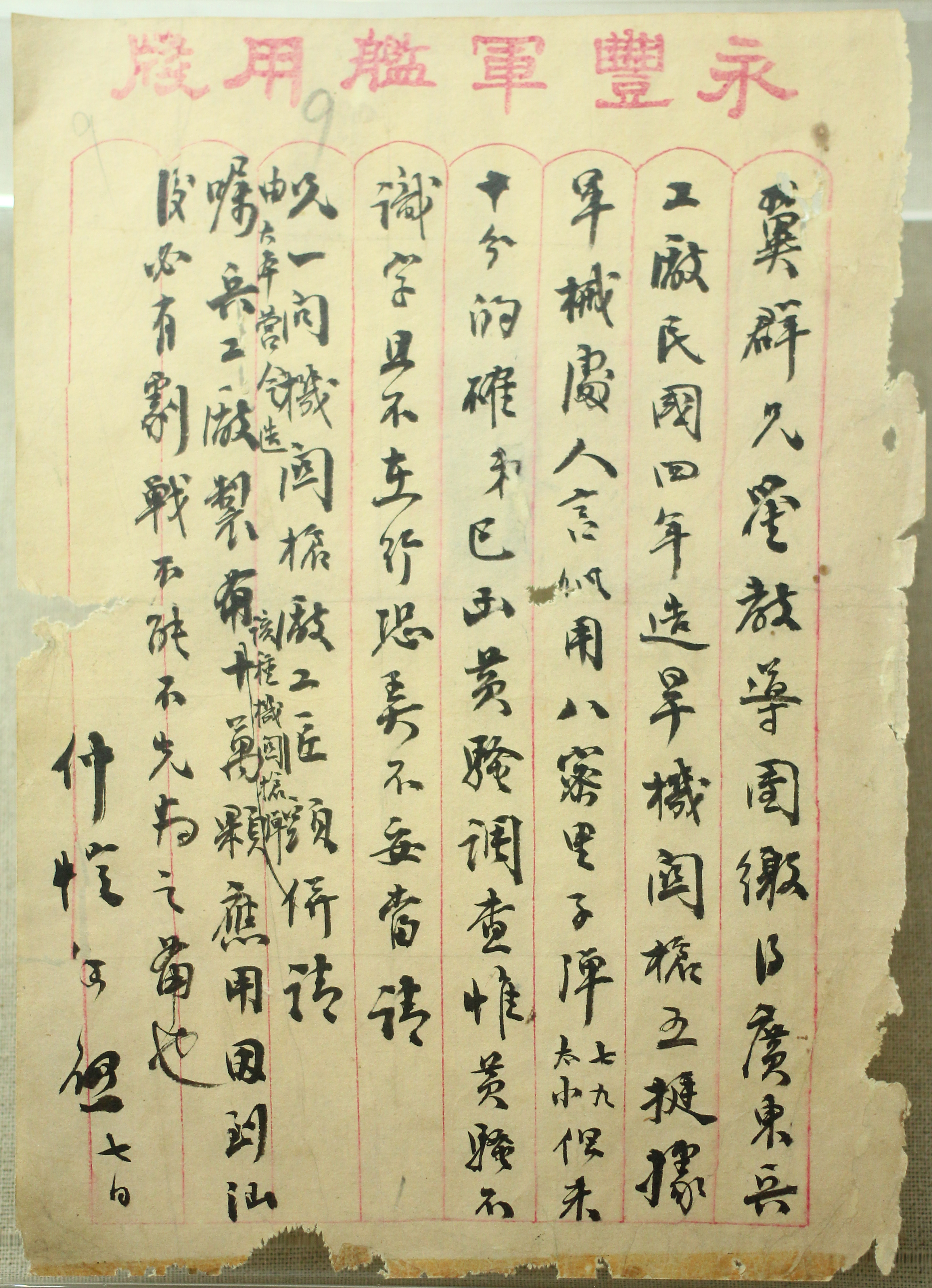 廖仲愷親筆書信。